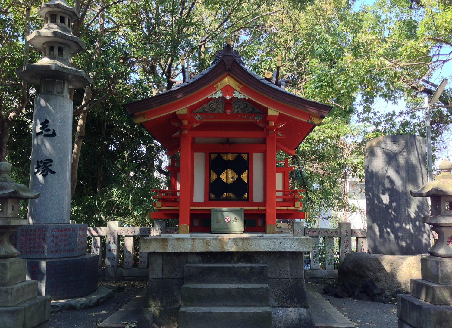 王子神社境内にある「関神社」と「毛塚」